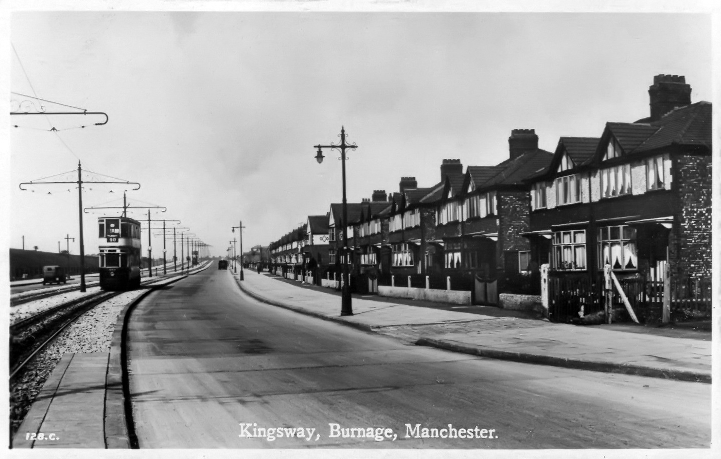 Kingsway, Burnage.jpg